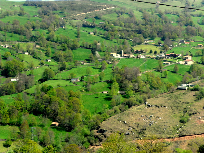 Paisaje característico: prados salpicados por cabañas.